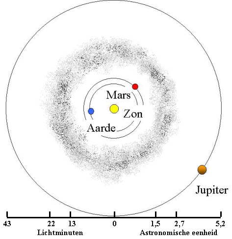 Asteroïdenring.